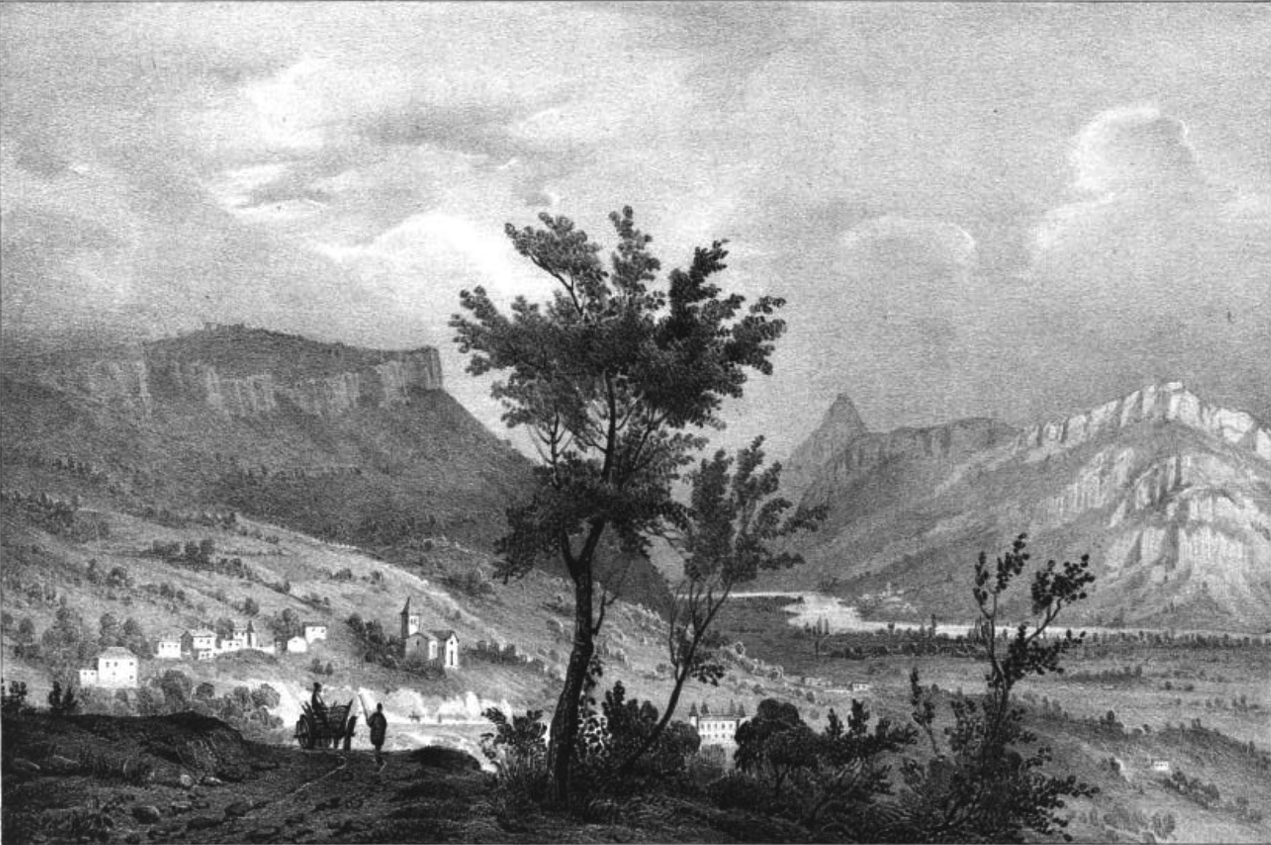 Album du Dauphiné - tome III, litographie de Coublevie